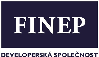 Logo finep